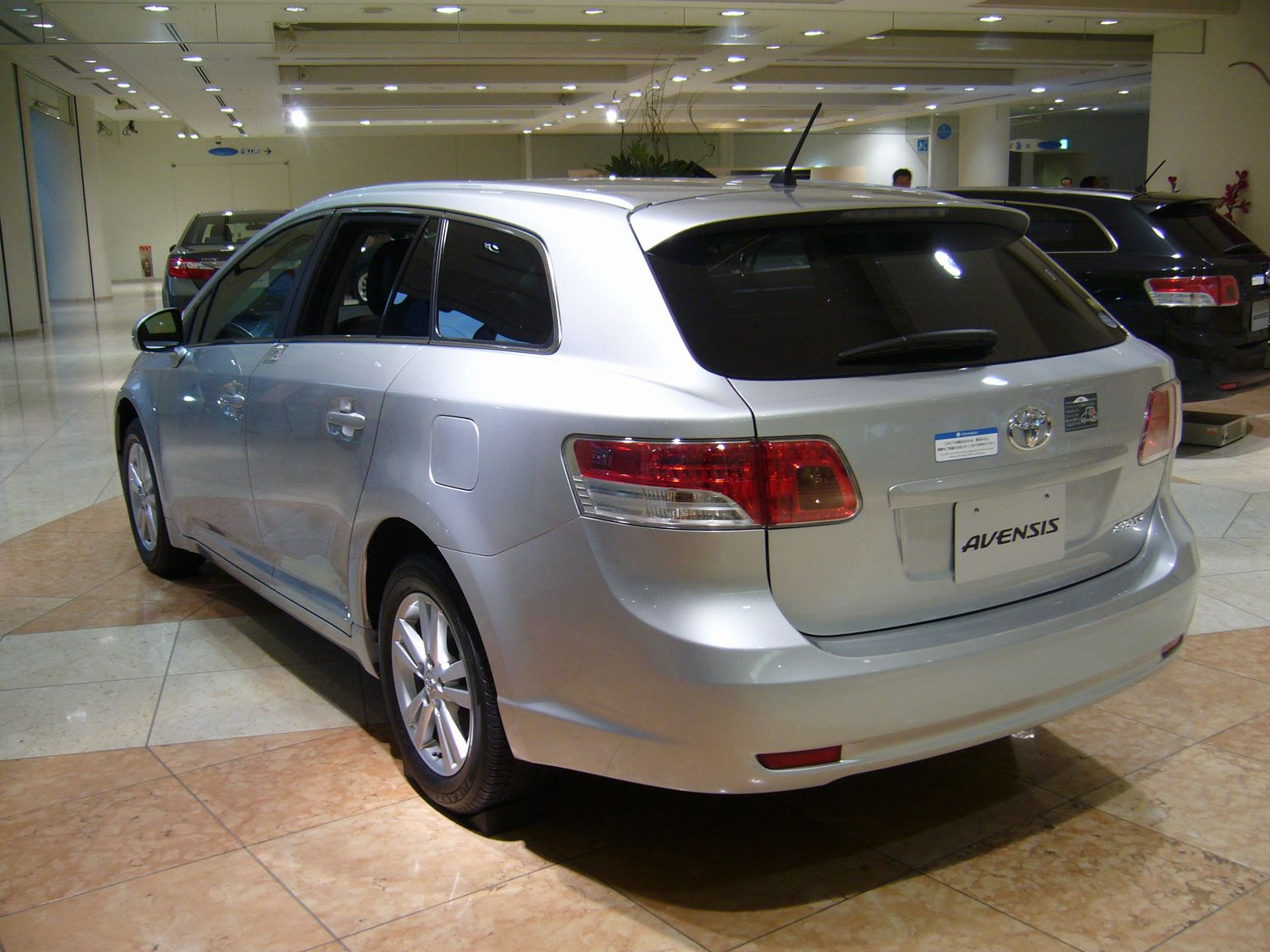 トヨタ・アベンシス